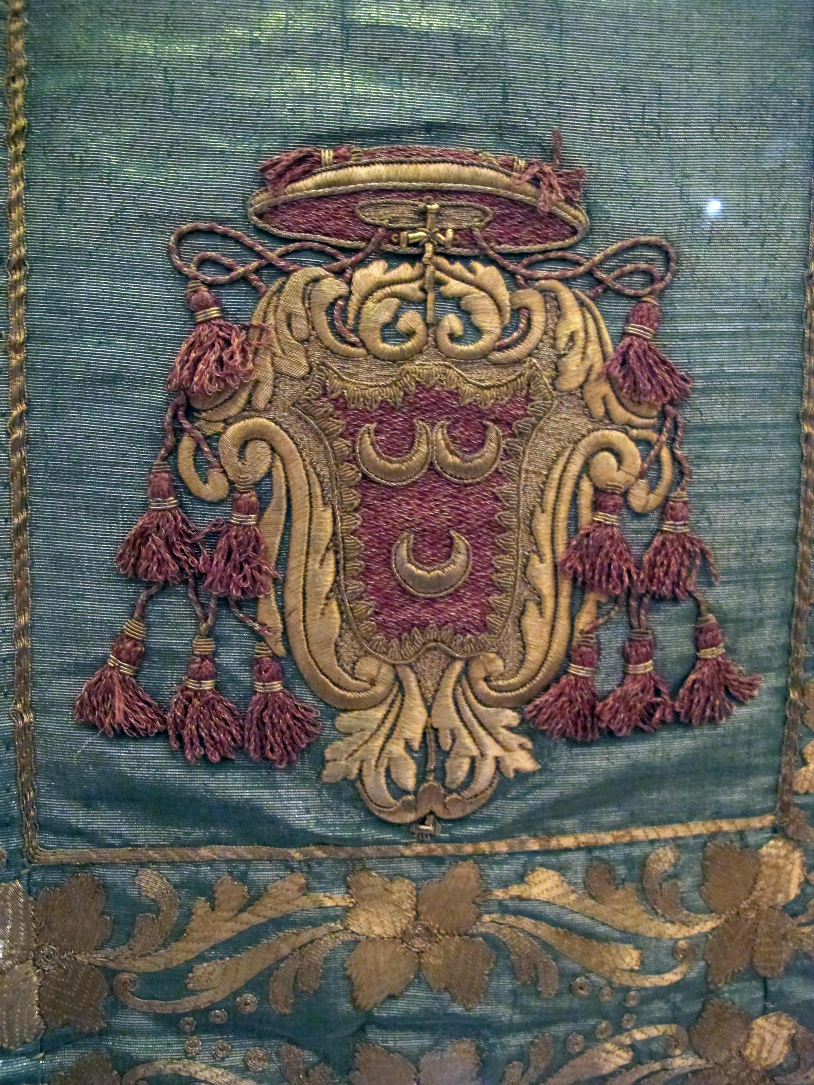 Ferrara - Museo della Cattedrale This is a photo of a monument which is part of cultural heritage of Italy.